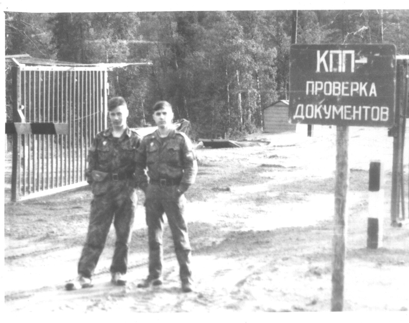 Суоперя 96